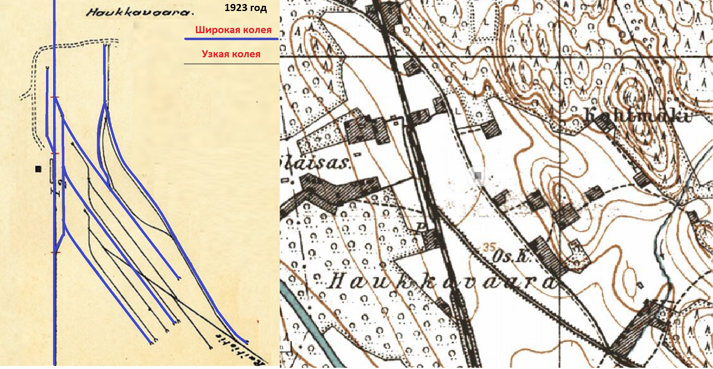 Схема и карта Хауккаваара.